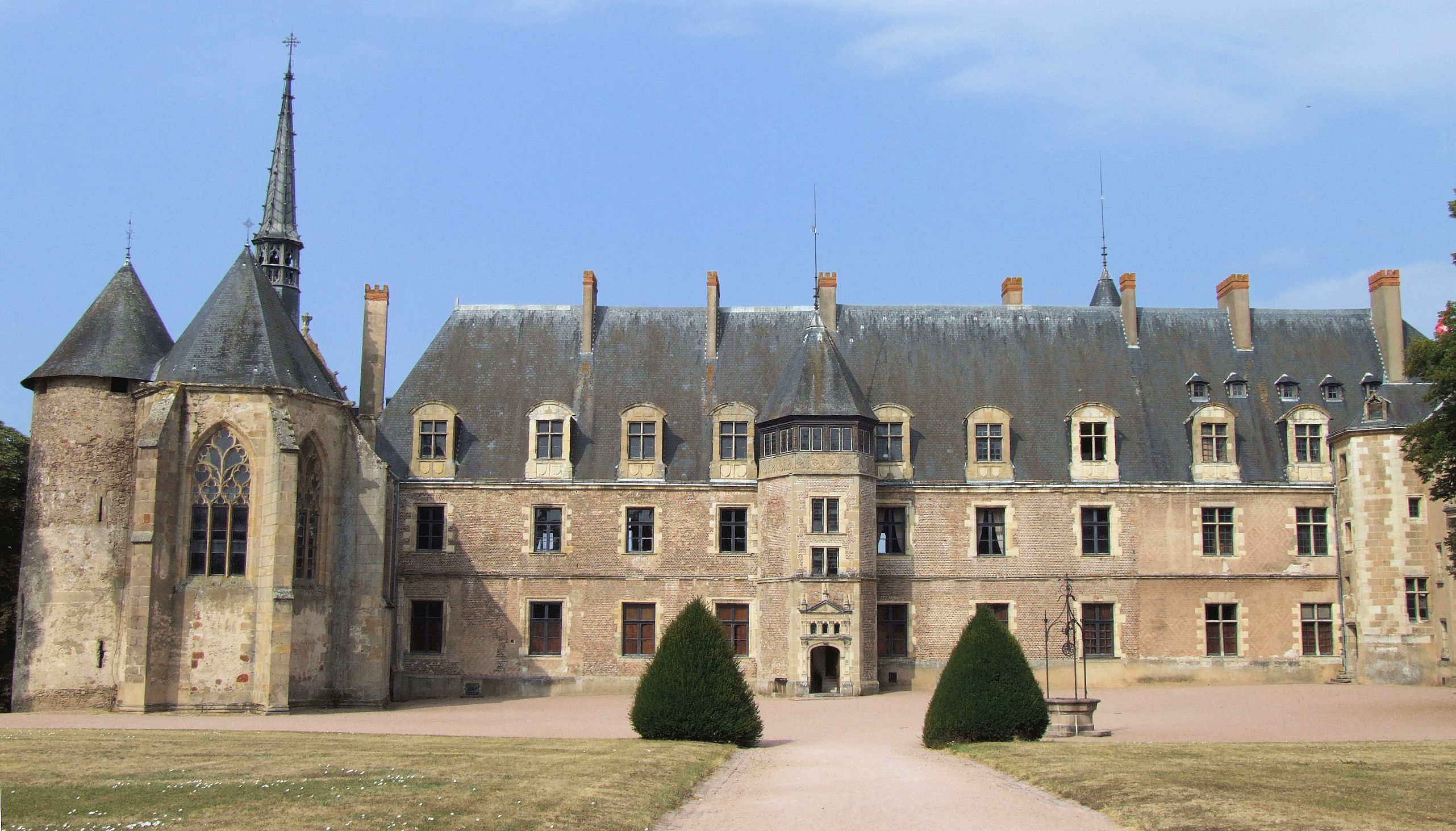 Lapalisse - Château de La Palice - Le château côté cour avec la partie centrale Renaissance, à gauche la chapelle Saint-Léger avec une tour du château du XIIIe siècle